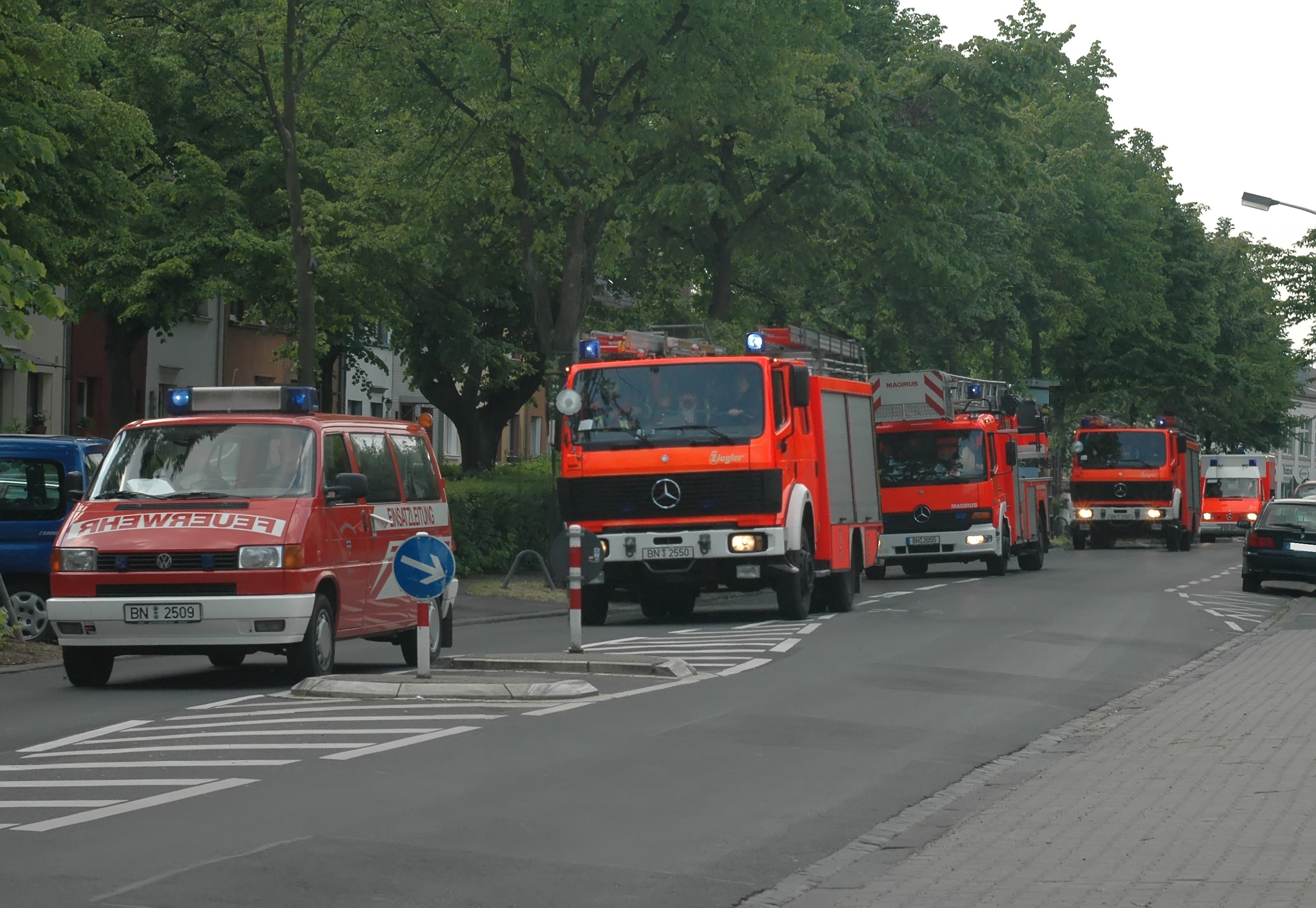 Die Berufsfeuerwehr Bonn fährt mit Sondersignal zu einer Einsatzstelle. Angeführt wird die Kolonne von dem Einsatzleitwagen (ELW1), gefolgt von einem Hilfeleistungslöschfahrzeug (HLF). Dahinter fährt eine Drehleiter DLK 23/12 und ein weiteres Hilfeleistungslöschfahrzeug. Zur Fremd- und Eigensicherung bei Verletzungen begleitet ein Rettungswagen (RTW) die Einheit. Fotomontage aus fünf Einzelaufnahmen, um die Fahrzeugabstände zu verkürzen.